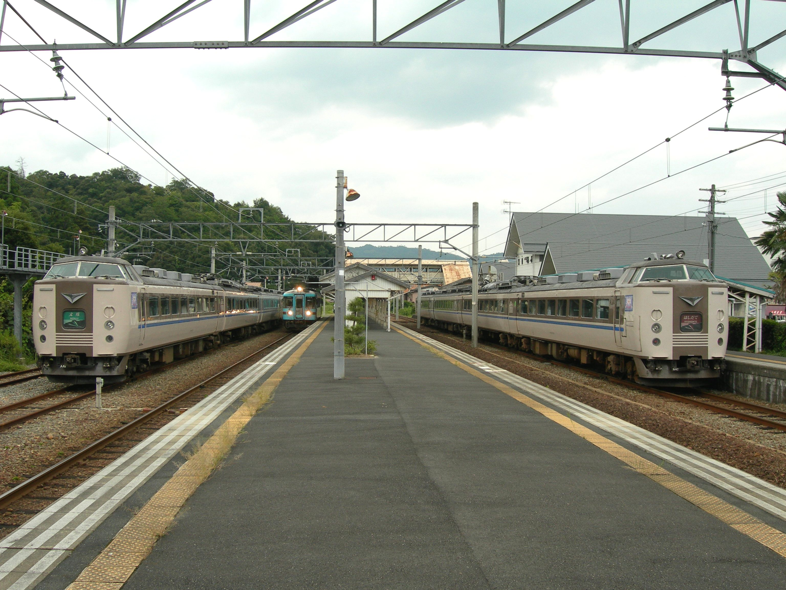 天橋立駅ホーム